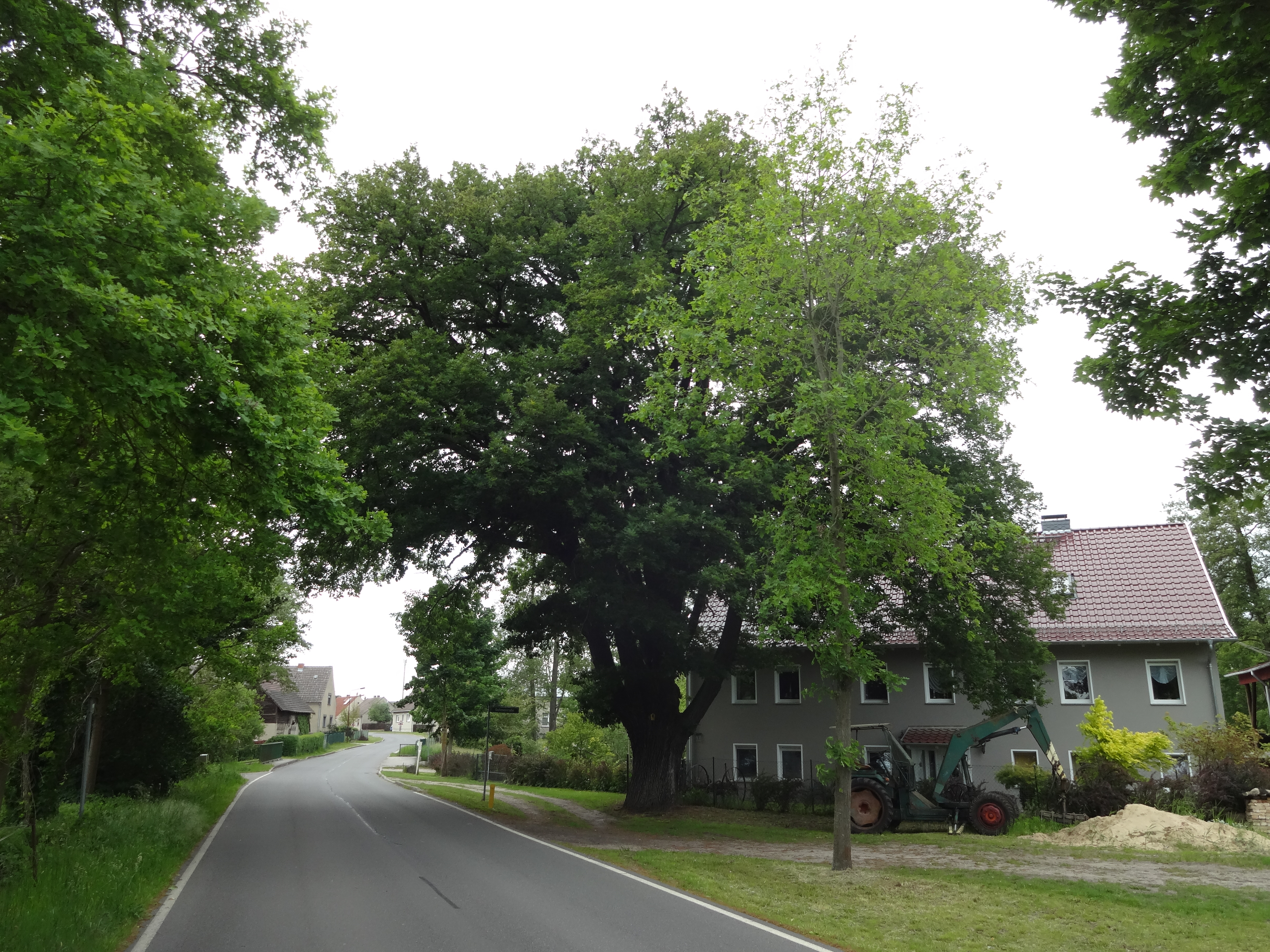 als Naturdenkmal geschützte Eiche in der Dahmestraße in Teurow